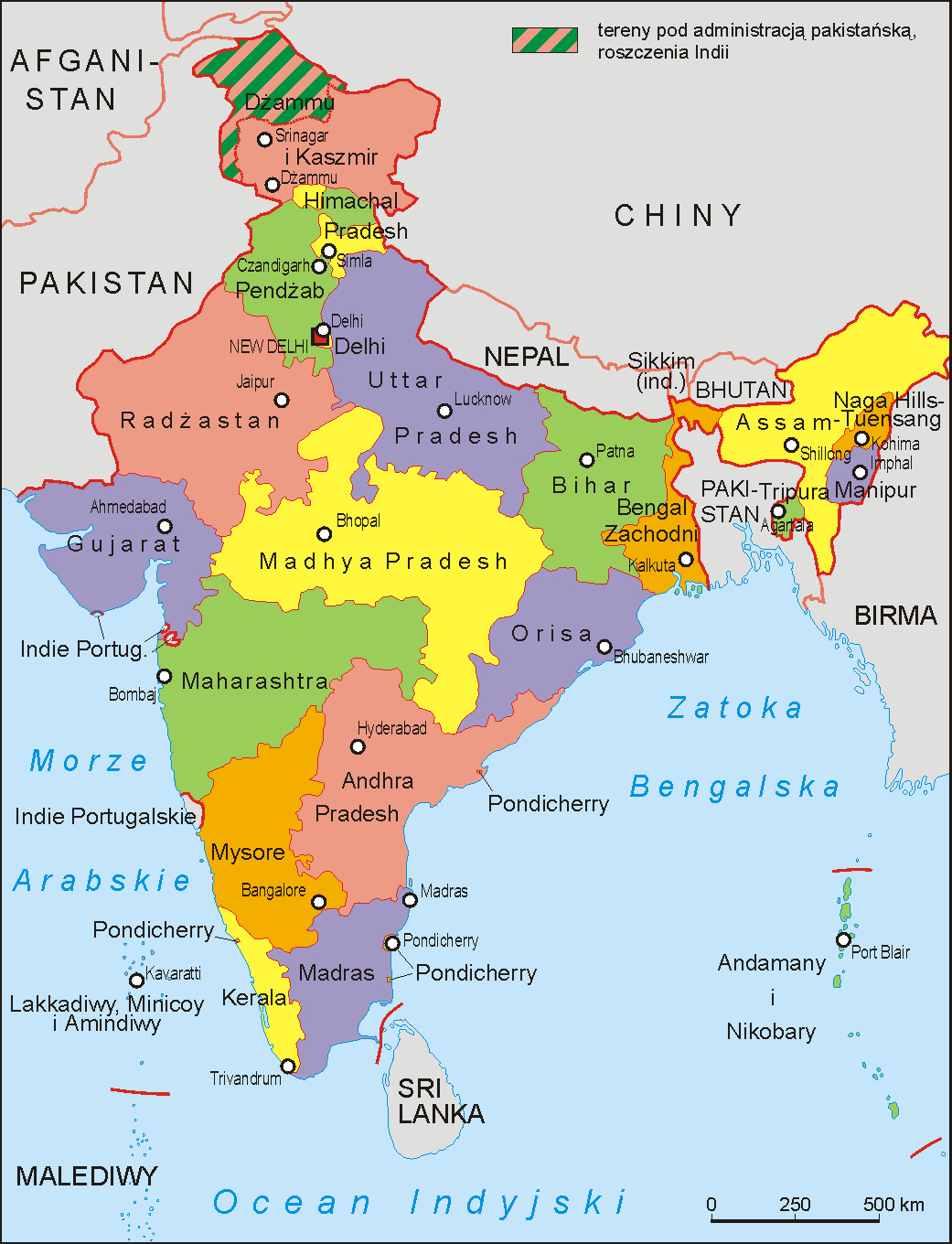 Podział administracyjny Indii w 1960 roku. Autor Aotearoa